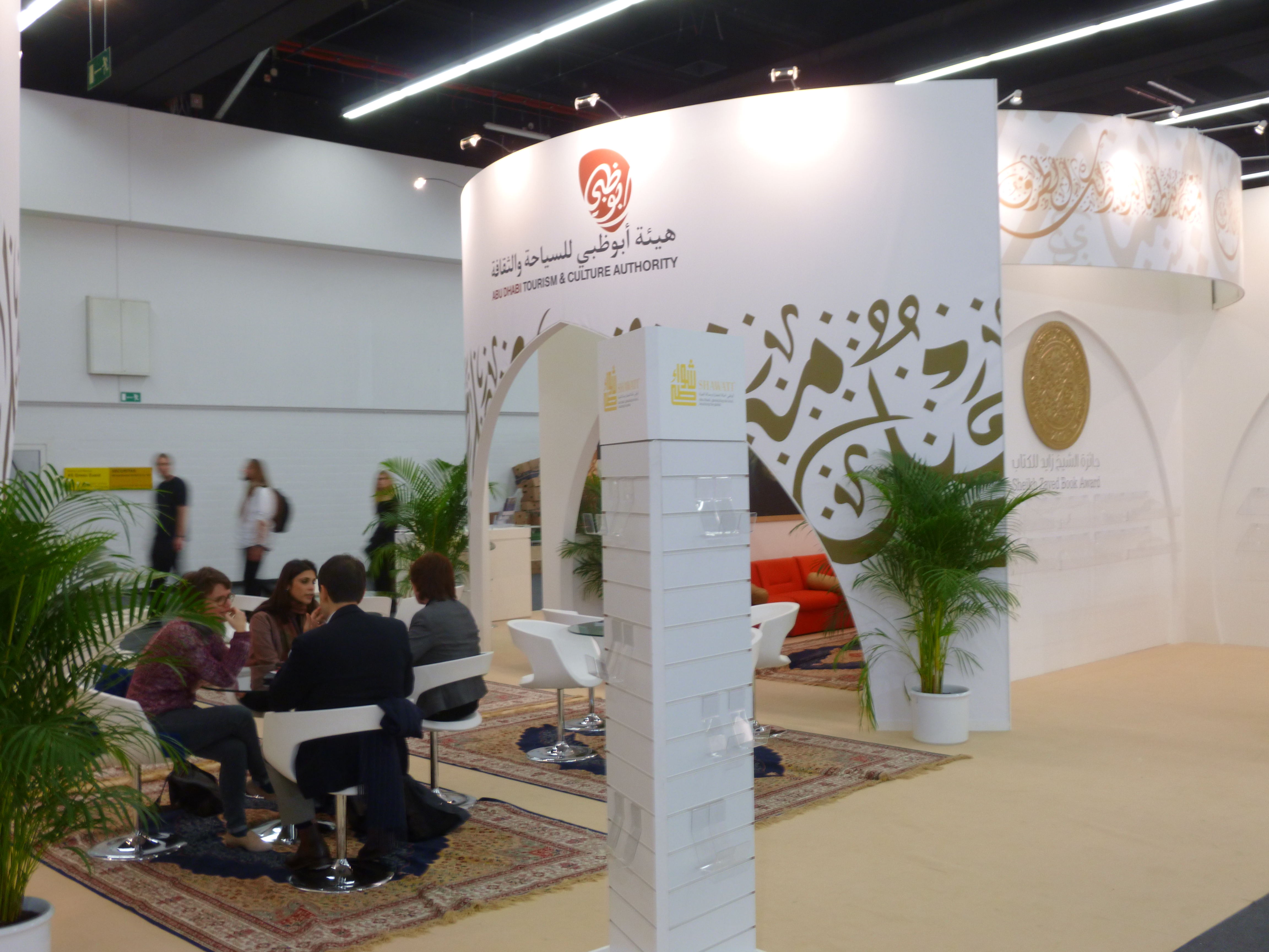 stando de la literaturo de Abu-Dabio en la Frankfurta librofoiro 2012